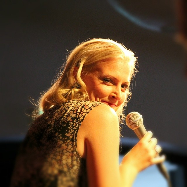 Sidsel Storm på Krudttønden under Copenhagen Jazz Festival den 2014-07-04. Fotograf Kjeld Johansen.